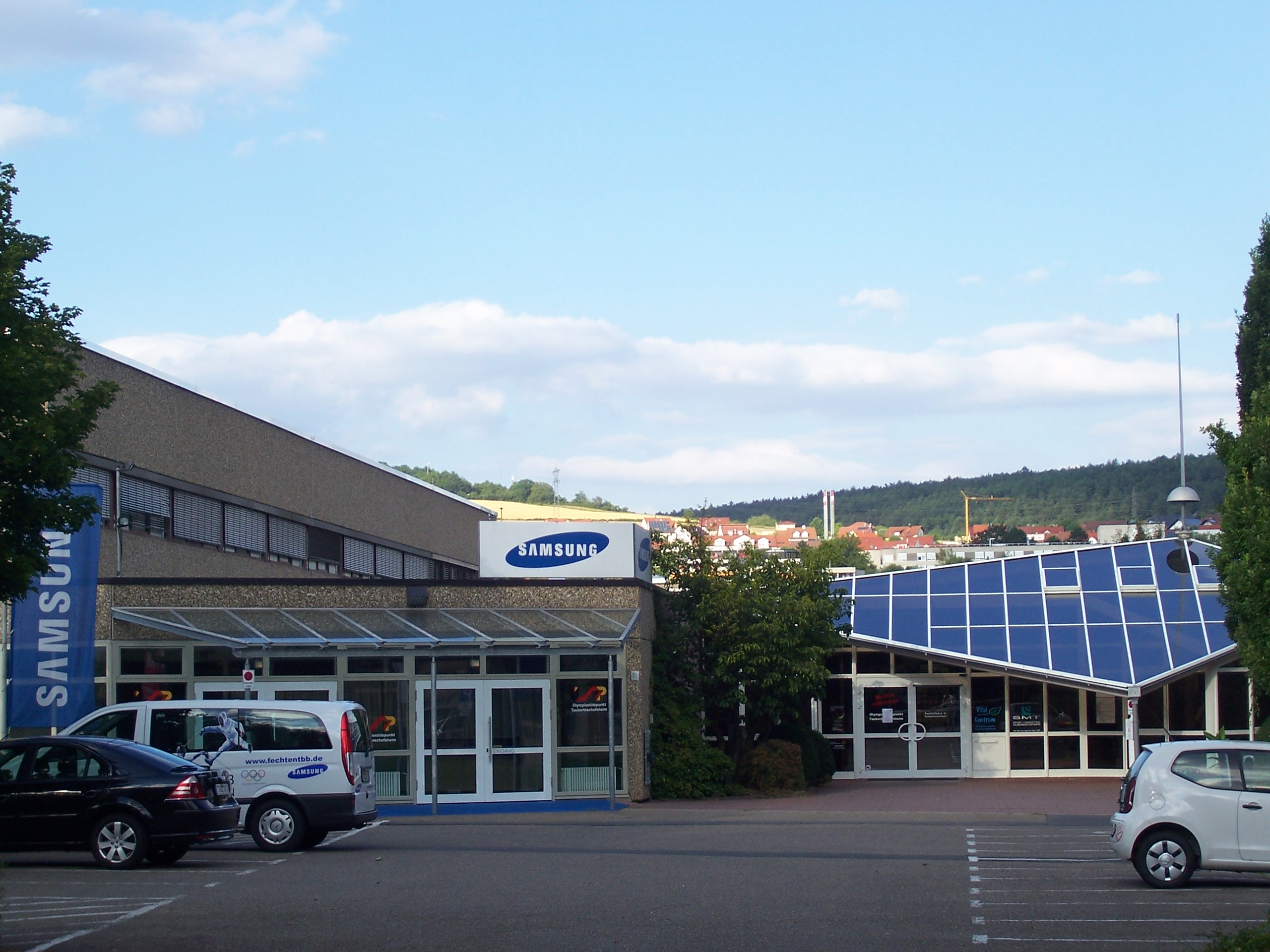 Eingang des Olympiastützpunktes Tauberbischofsheim